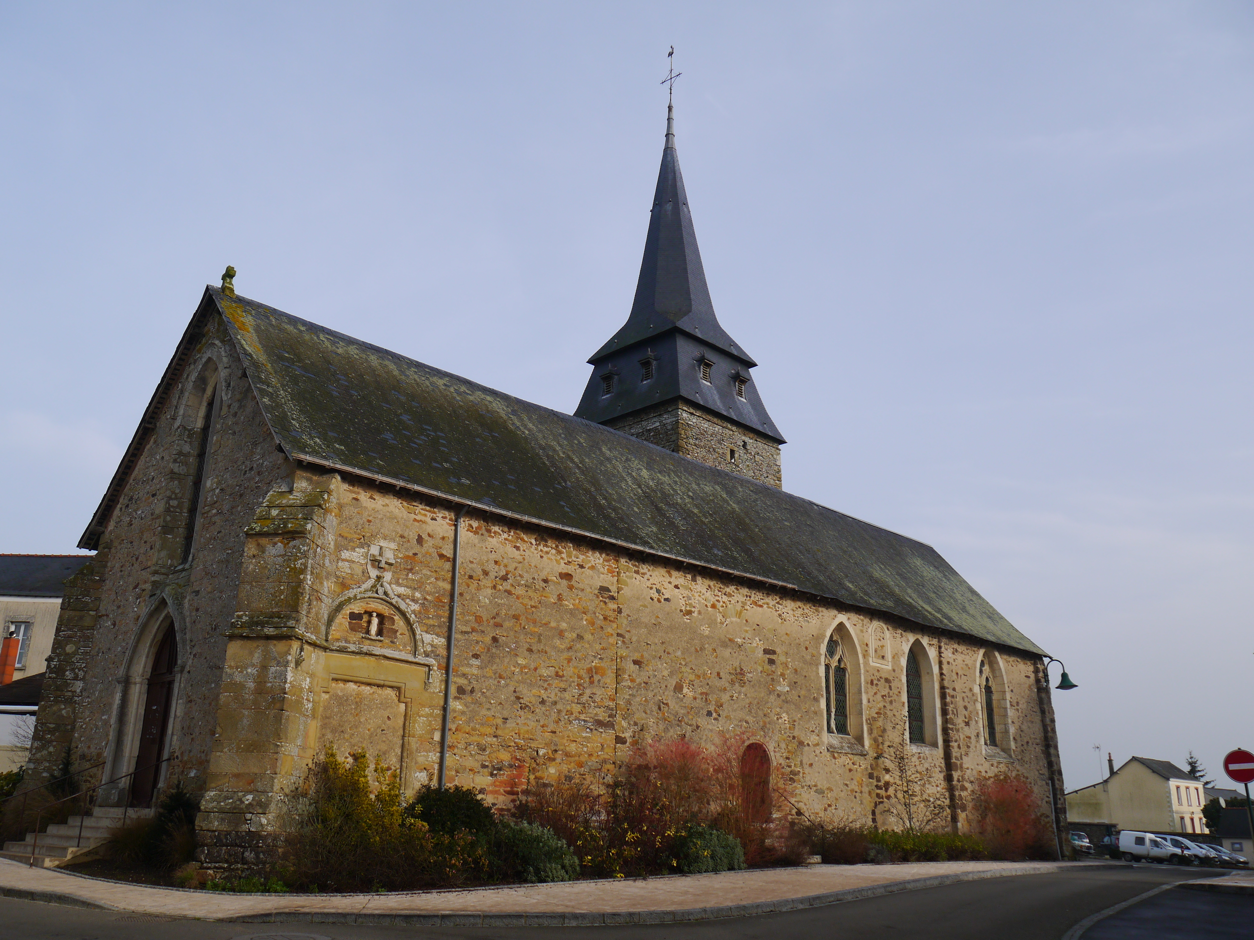 L'église Saint-Aubin.